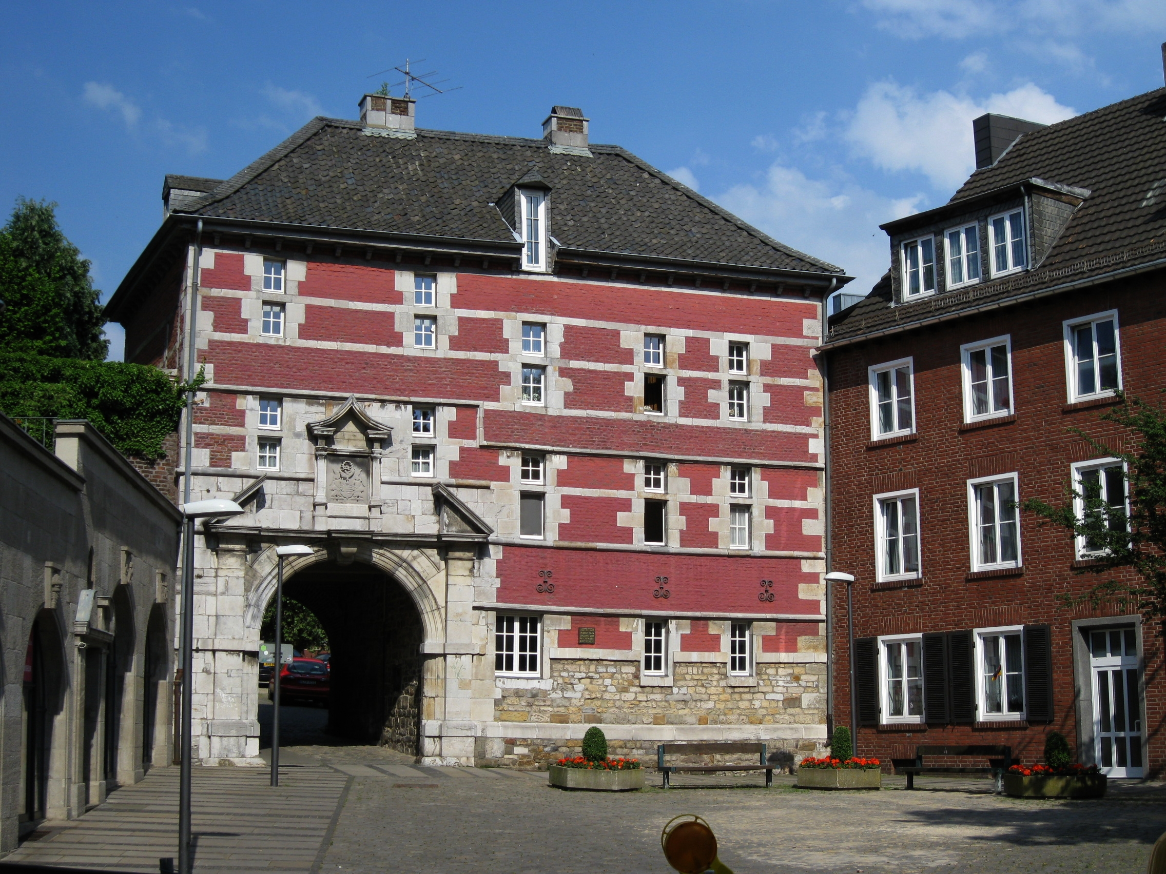 Abteitor in Burtscheid, erbaut 1644, früher Zugang zur Abtei Burtscheid